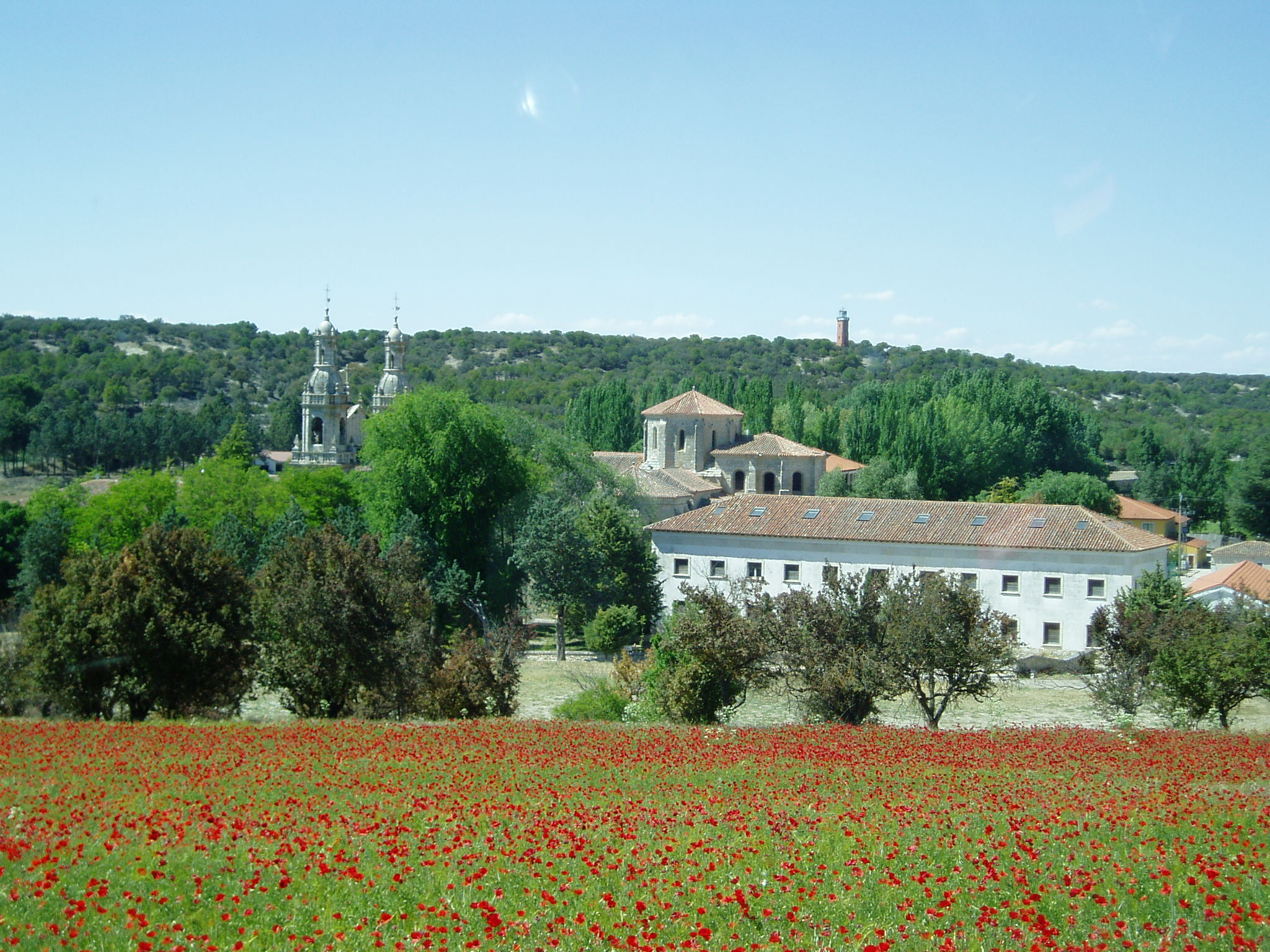 Montes Torozos y páramo de Torquemada-Astudillo This is a photography of a Special Area of Conservation in Spain with the ID: ES4140129. Natura2000 entry, EEA entry